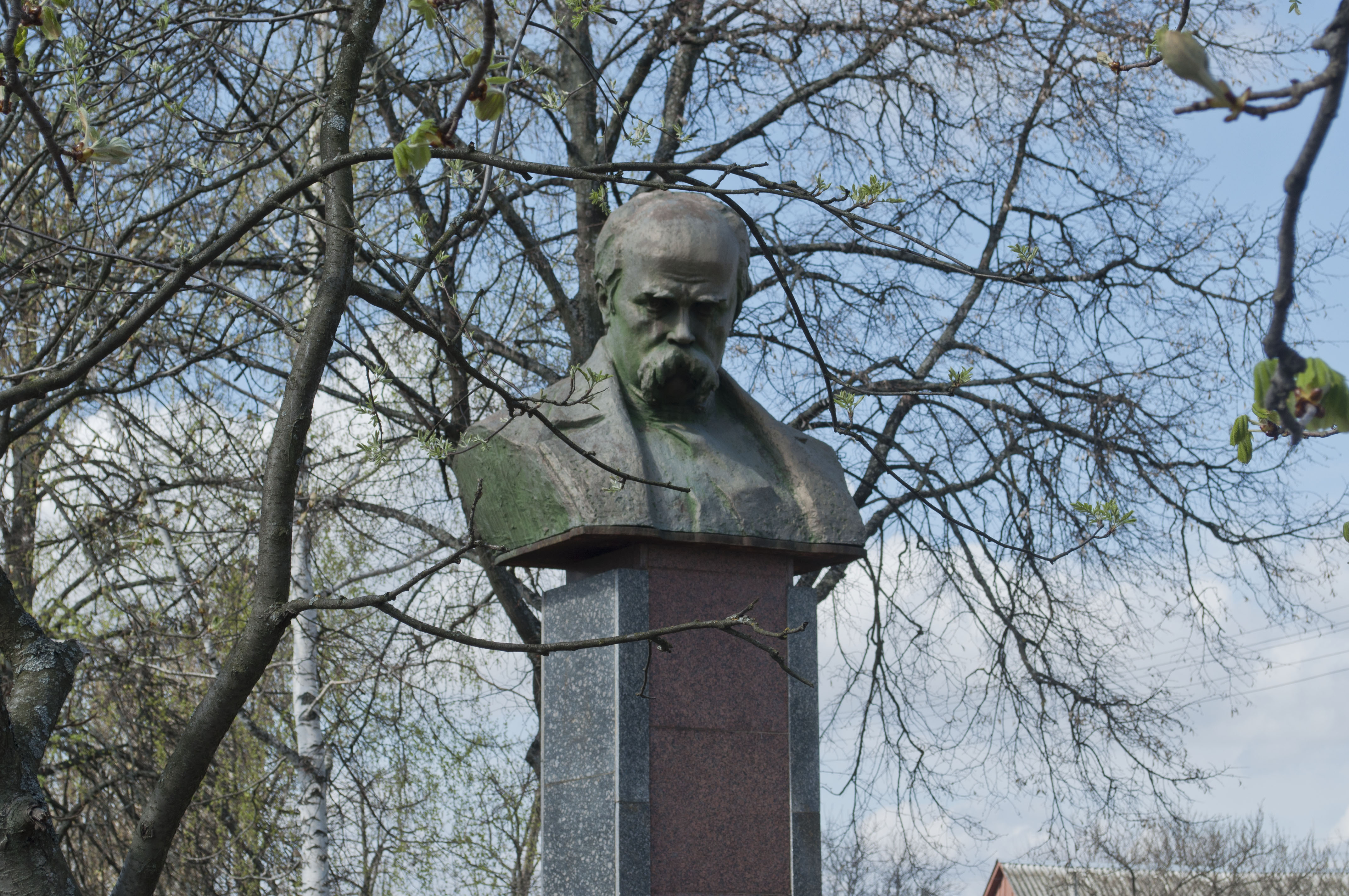 Пам'ятник Т.Г. Шевченку, Кролевець, бул. Шевченка